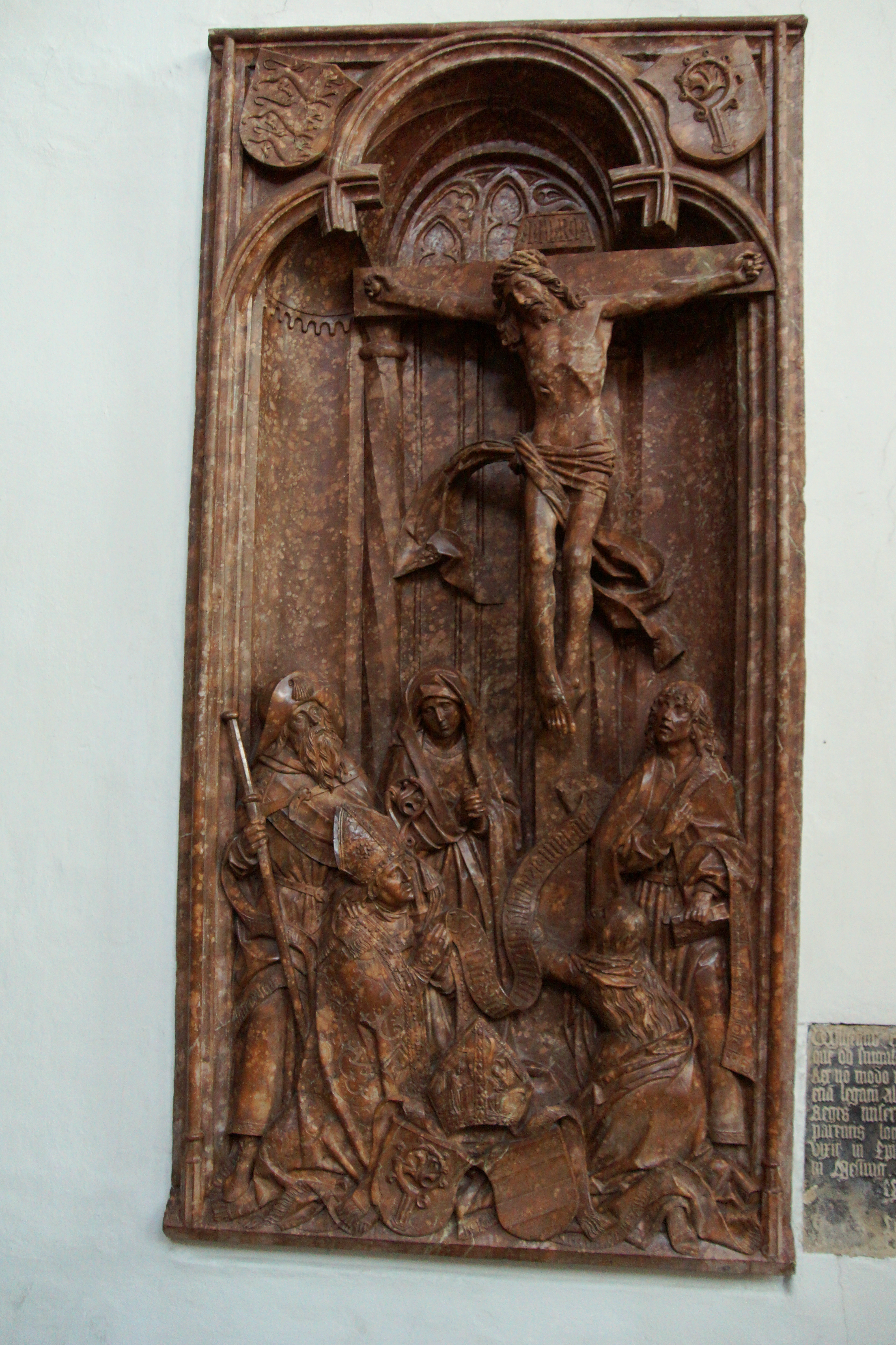 Der Willibaldsdom zu Eichstätt